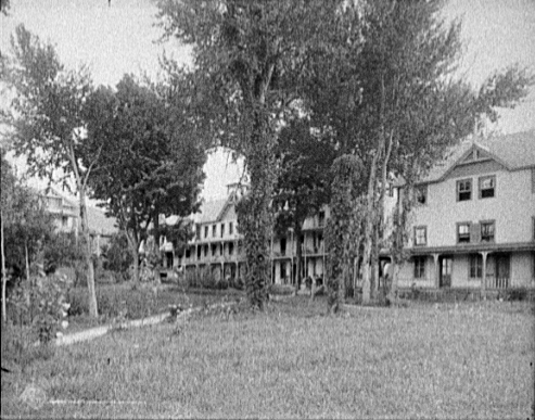 Hulett House, Lake George, N.Y.